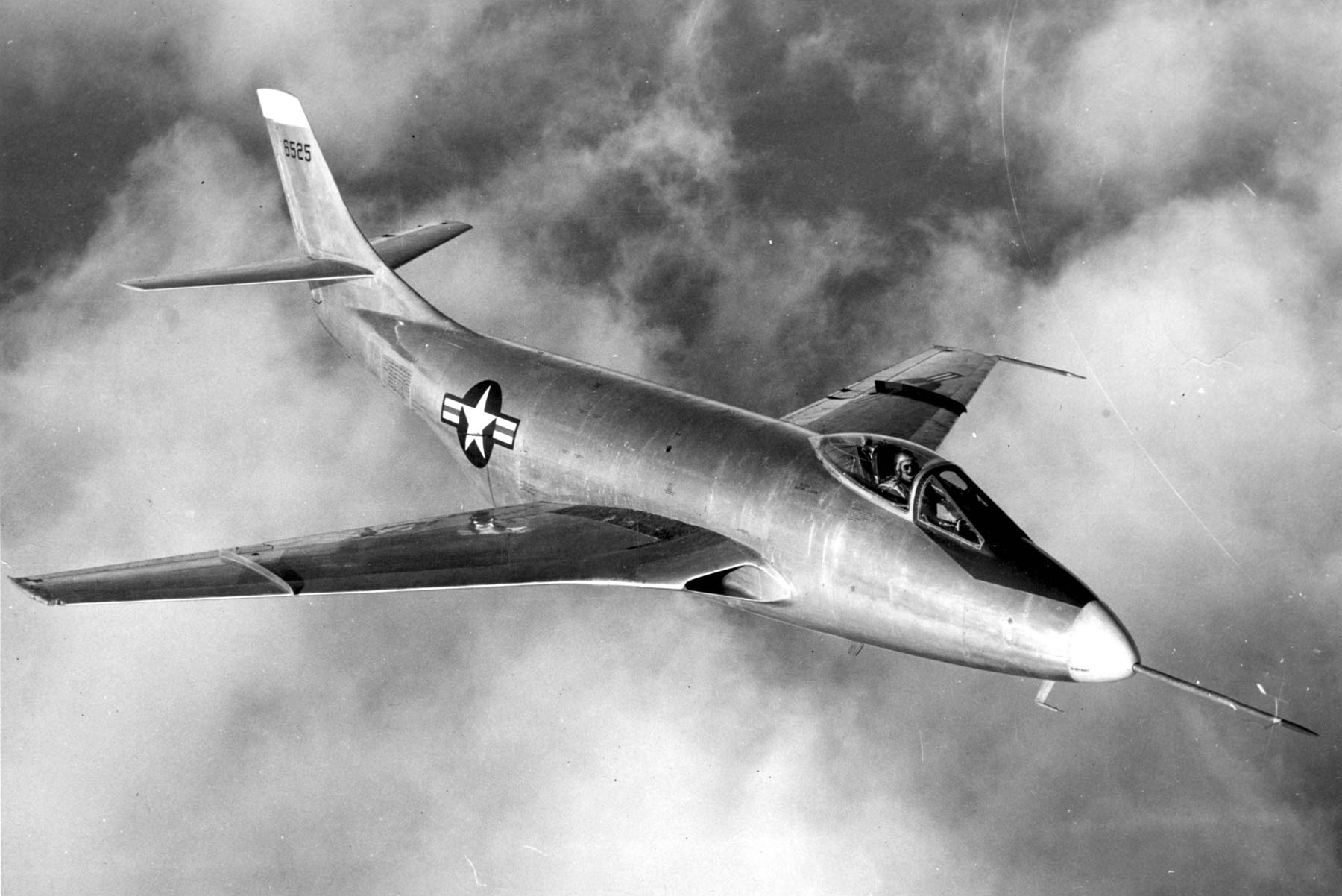 McDonnell XF-88 (SN 46-525) in flight